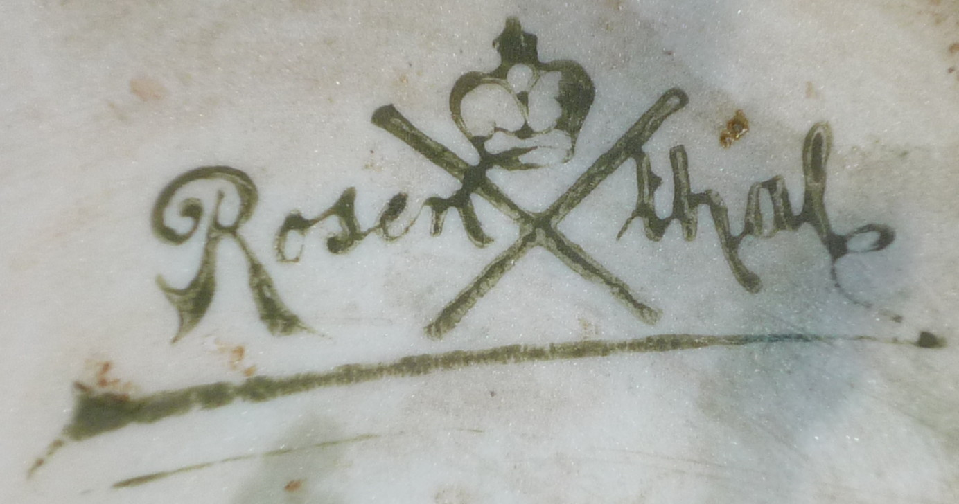 Marque signature vers 1900 du fabricant de porcelaines Rosenthal , Allemagne, vers 1900